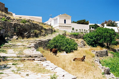 Titel: Monopati naar Kastro Locatie: Sikinos, Griekenland Datum: juni 2004 Fotograaf: Gebruiker:IMFJ